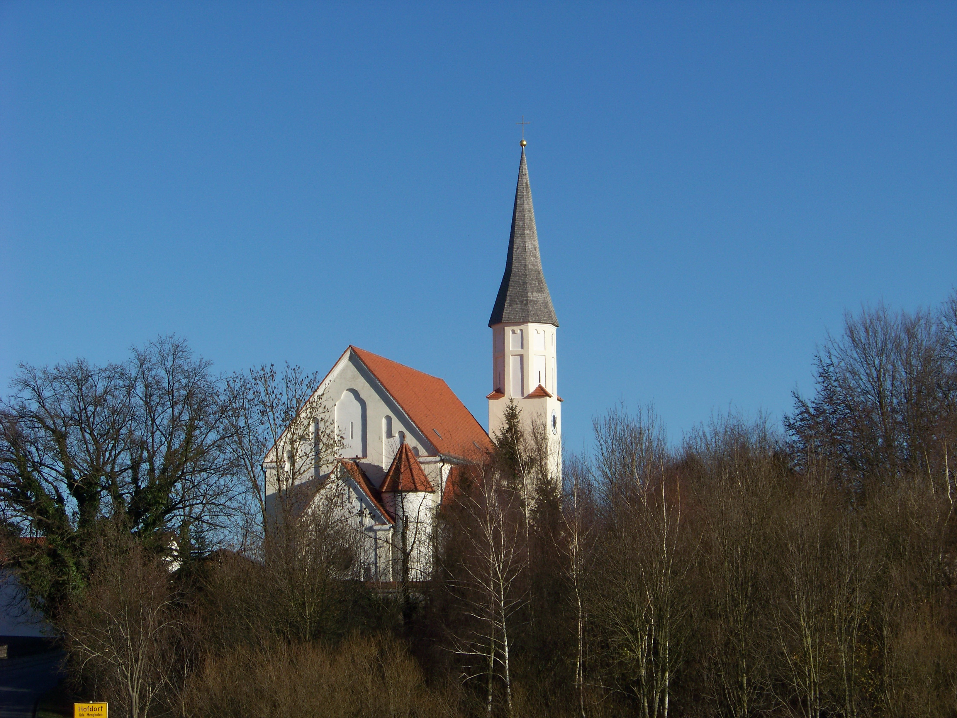 Süßkofener Straße 25. Kath. Pfarrkirche St. Margaretha, neuromanischer Saalbau mit Südturm, Einbeziehung gotischer Teile in Chor und Turm, von Heinrich Hauberisser, 1905; mit Ausstattung; Friedhofsmauer, westlicher und südlicher Teil erhalten, gleichzeitig.